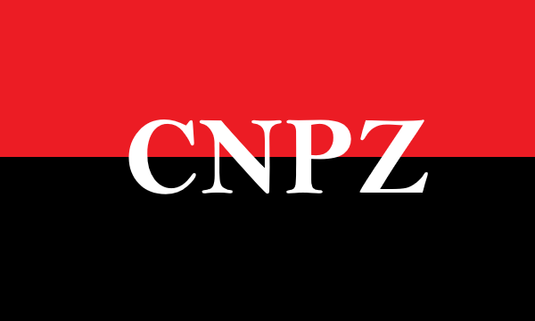 Logo de la guerrilla Comisión Néstor Paz Zamora